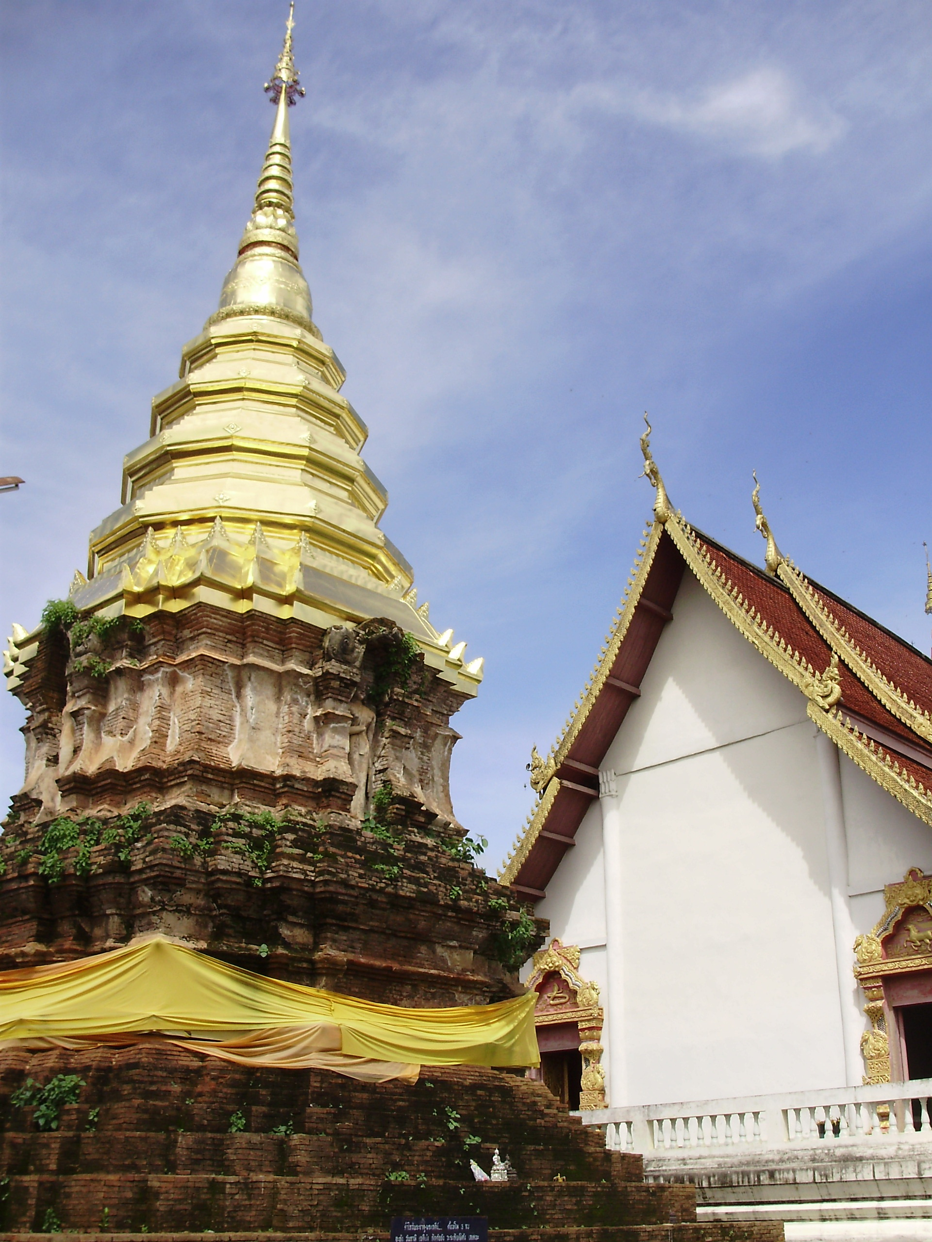 วัดผ้าขาวป้าน(ผ้าขาวพาน) ต.เวียง อ.เชียงแสน จ.เชียงราย